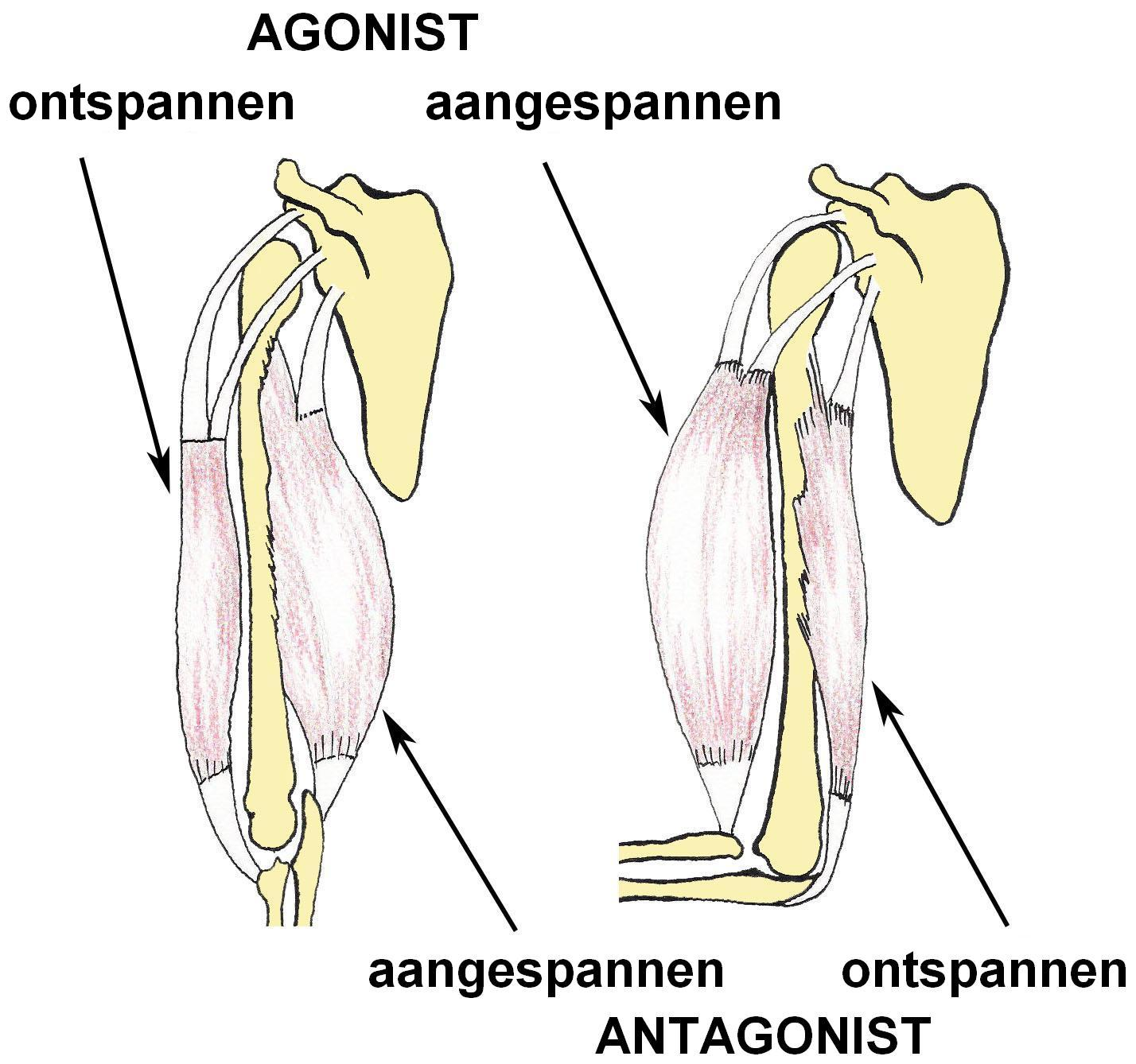 Schema dell'opposizione tra agonista e antagonista.